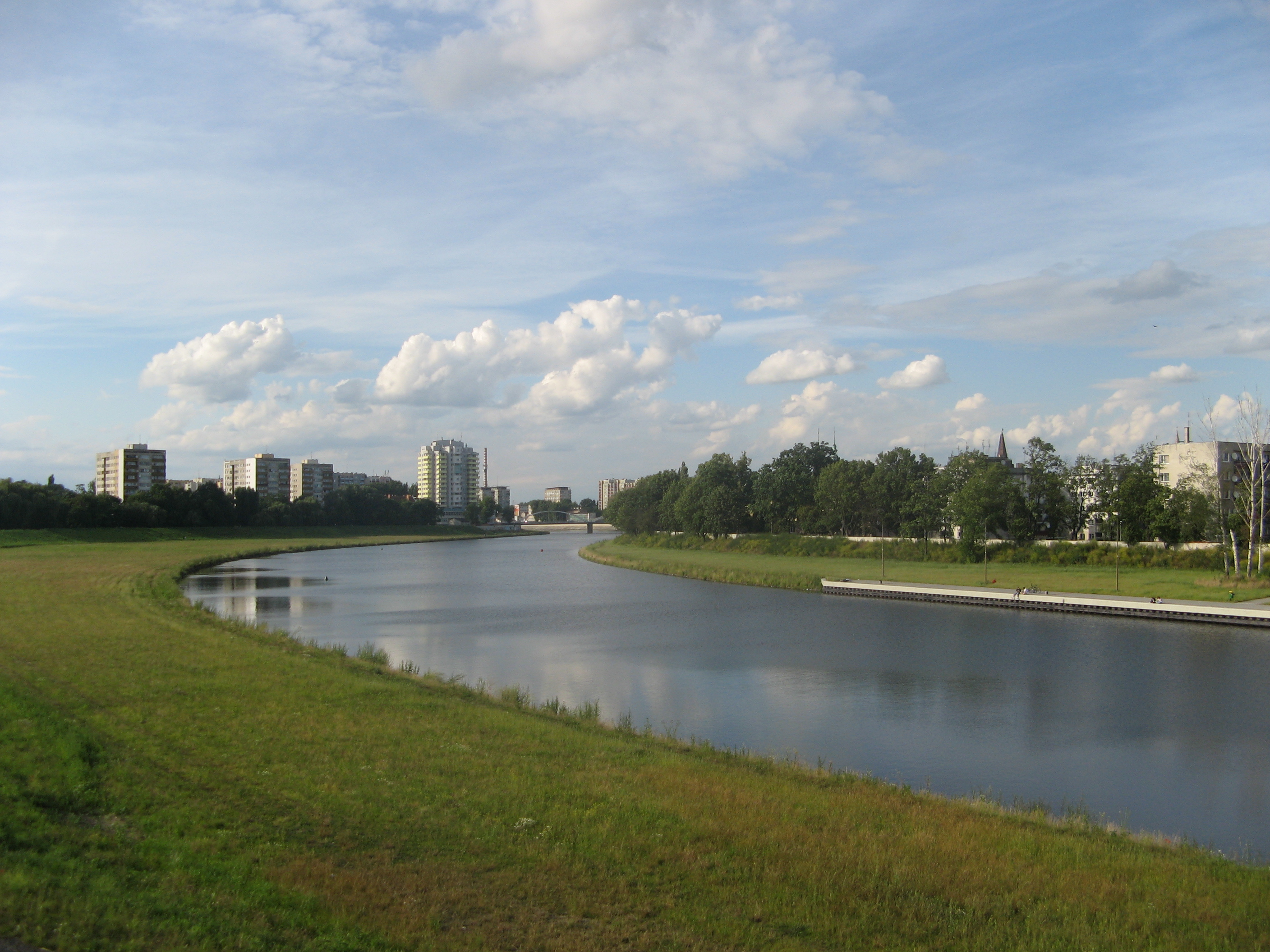 Odra przepływająca przez Opole